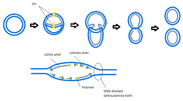 Replikatsioonil teeta mudeli järgi toimub esimeses etapis DNA ahelate lahtisulamine ning seejärel praimerite süntees. Praimerite pikendamise teel saadakse DNA lõigud, mis hiljem omavahel ühendatakse. Replikatsiooni tulemuseks on kaks kaheahelalist rõngas-DNA molekuli.